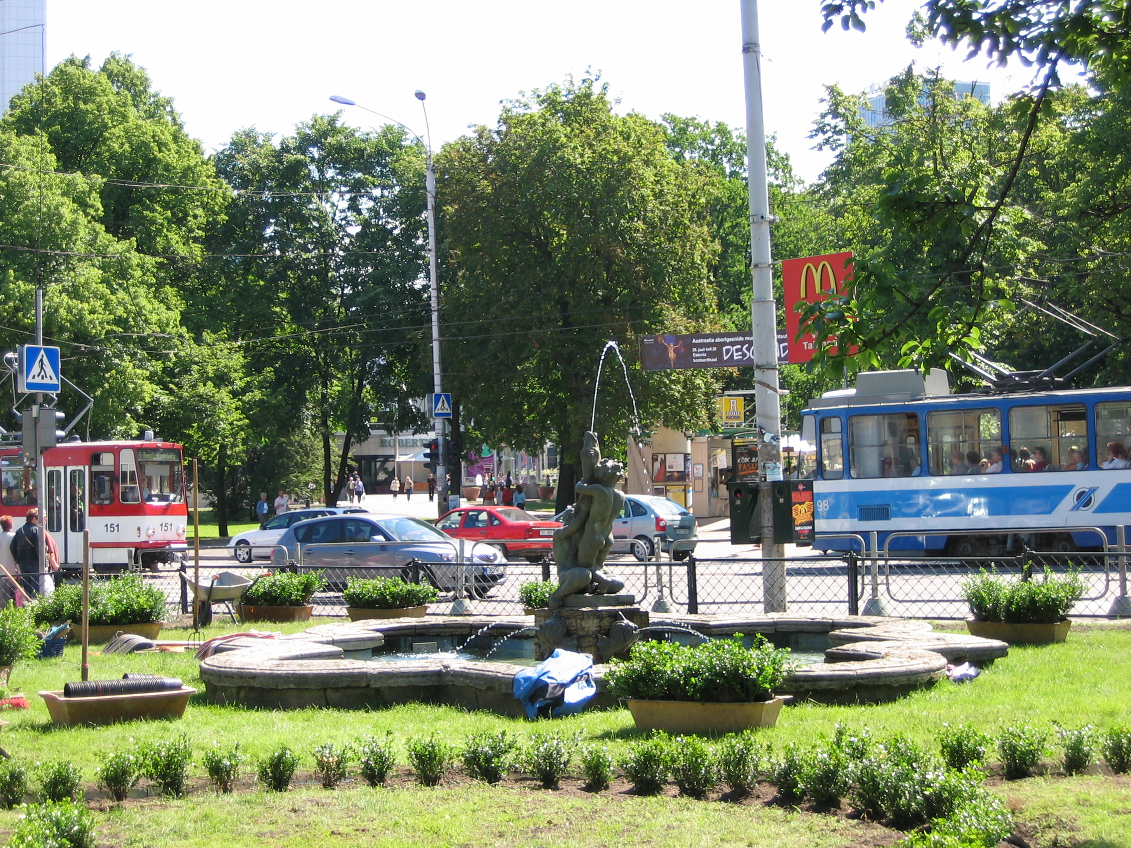 Tallinn, Stadtzentrum